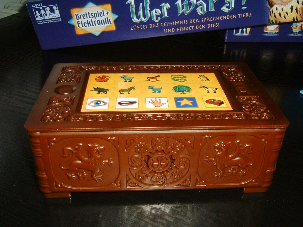 Schatzkiste des Kinderspiel des Jahres Wer war s